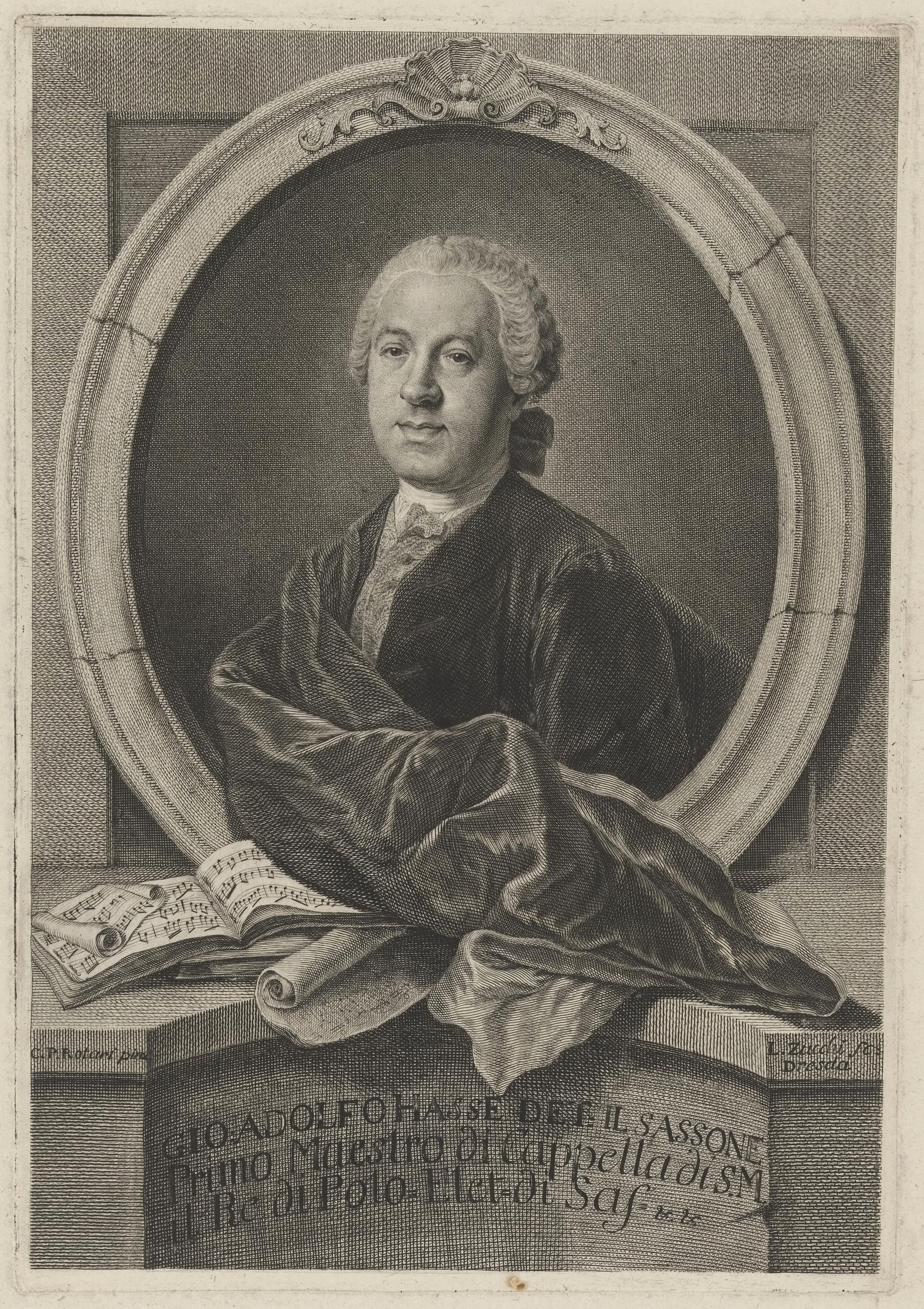 Bildnis des Gio. Adolfo Hasse Lorenzo Zucchi - faktischer Entstehungsort: Dresden - 1736/1779 - Coburg, Kunstsammlungen der Veste Coburg, Inv.-Nr. XII,199,5 Kunstsammlungen der Veste Coburg; Bilddatei: co-xii-199-5; Aufn.-Datum: 2012